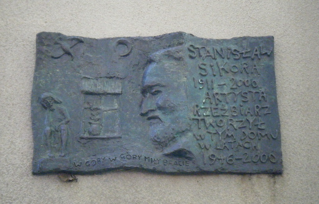 Tablica upamiętniająca Stanisława Sikorę. Warszawa, Saska Kępa, ul. Obrońców 28/30. Zaprojektowana przez Mateusza Sikorę.